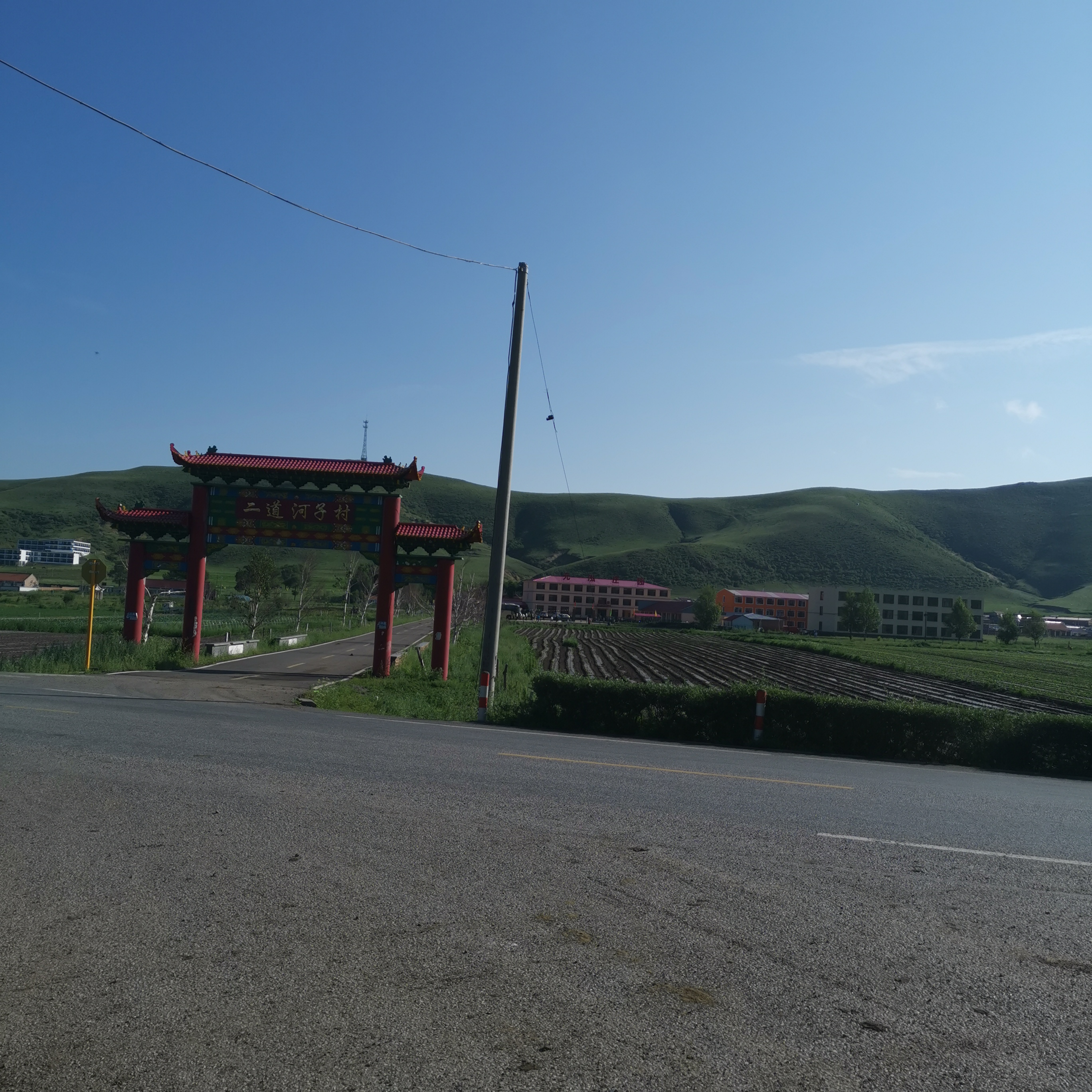 大滩镇二道河子村